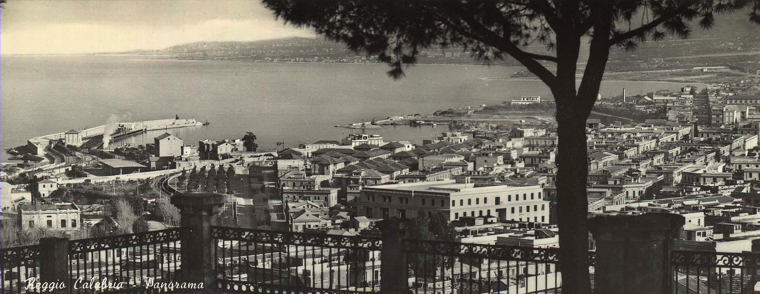 old postcard of Reggio Calabria